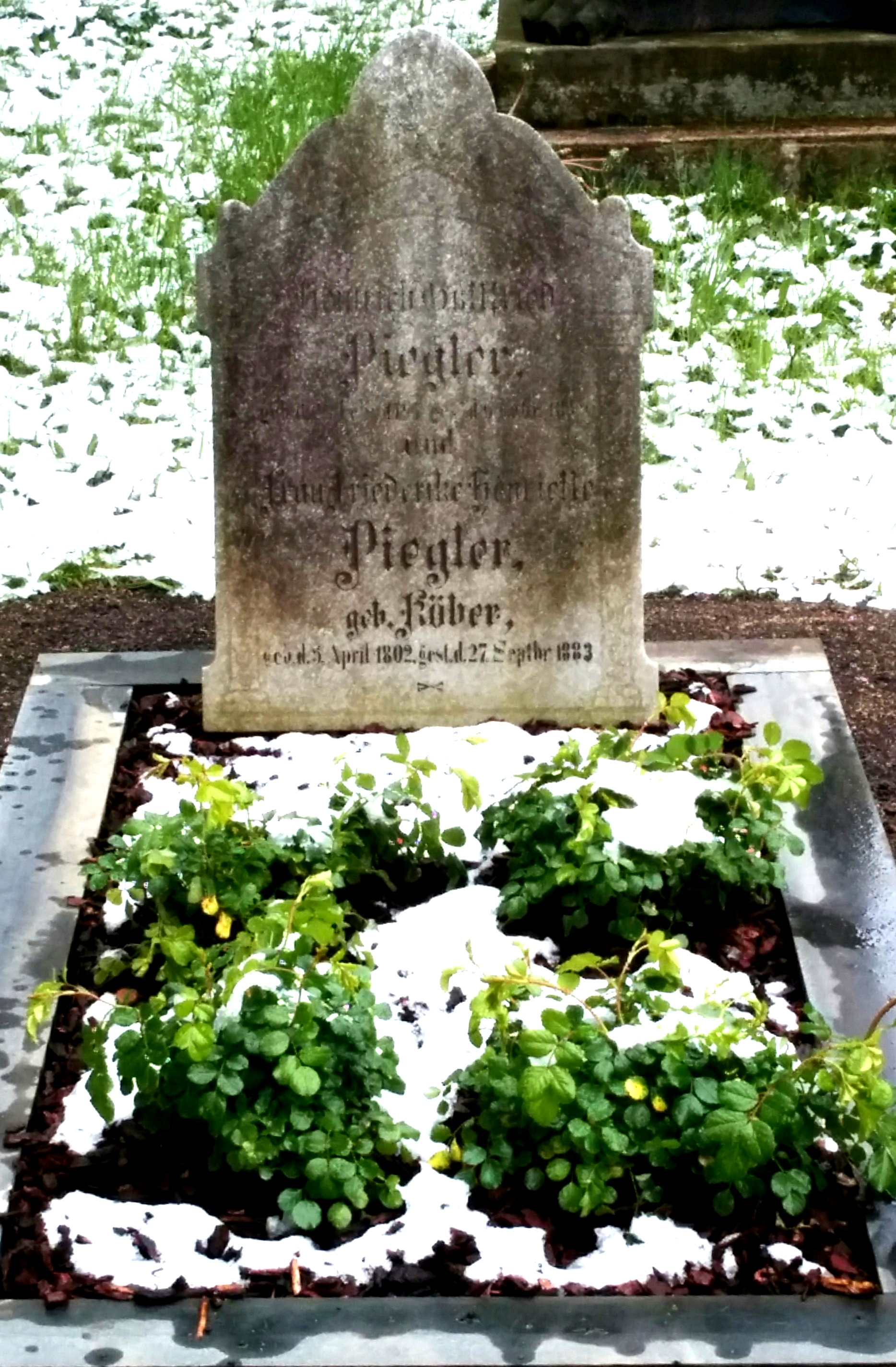 Grabmal des bedeutenden Schleizer Feuerzeugfabrikanten Heinrich Gottfried Piegler und seiner Frau auf dem Bergfriedhof in Schleiz